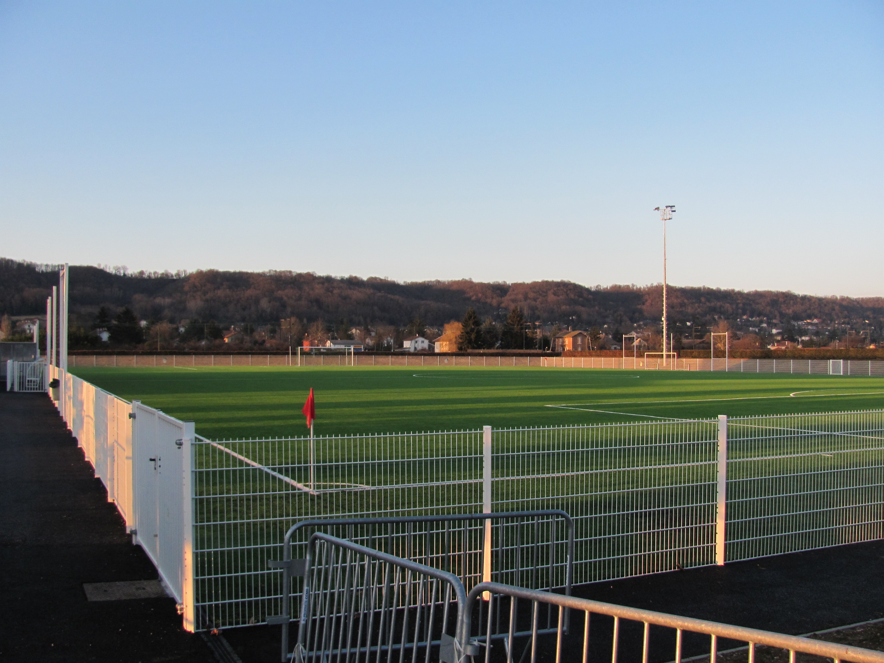 Stade du Forum, Saint-Maurice-de-Beynost, Ain Sud Foot.